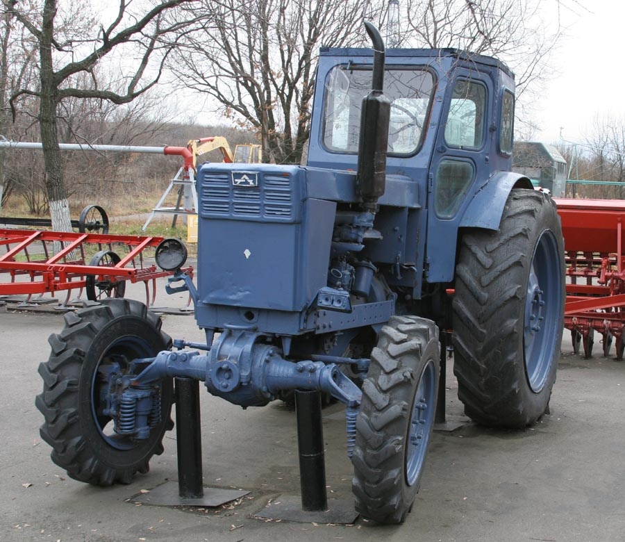 Трактор Т-40 в Саратове на Соколовой горе